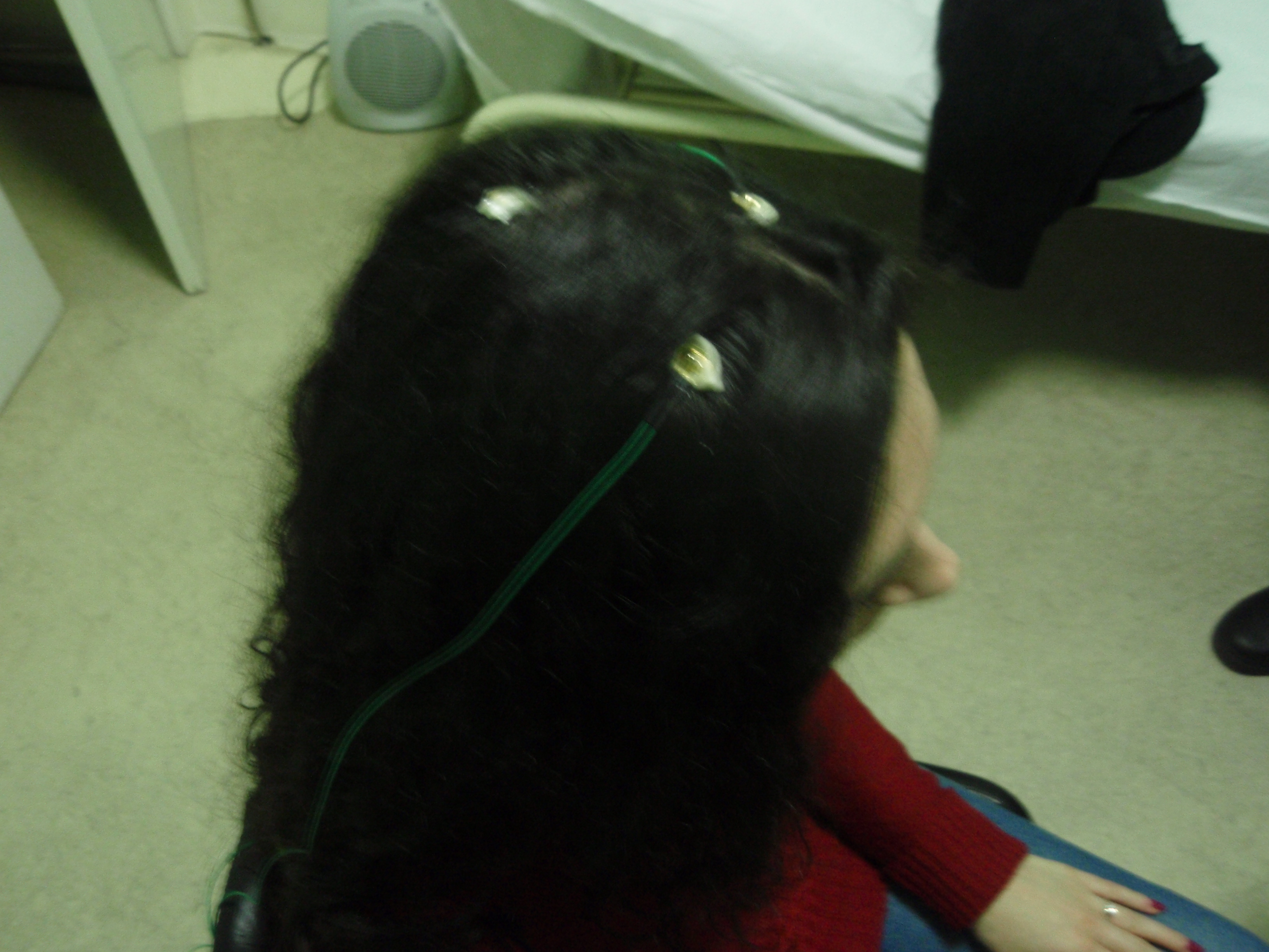 Paciente de Neurofeedback, exibindo os elétrodos EEG.